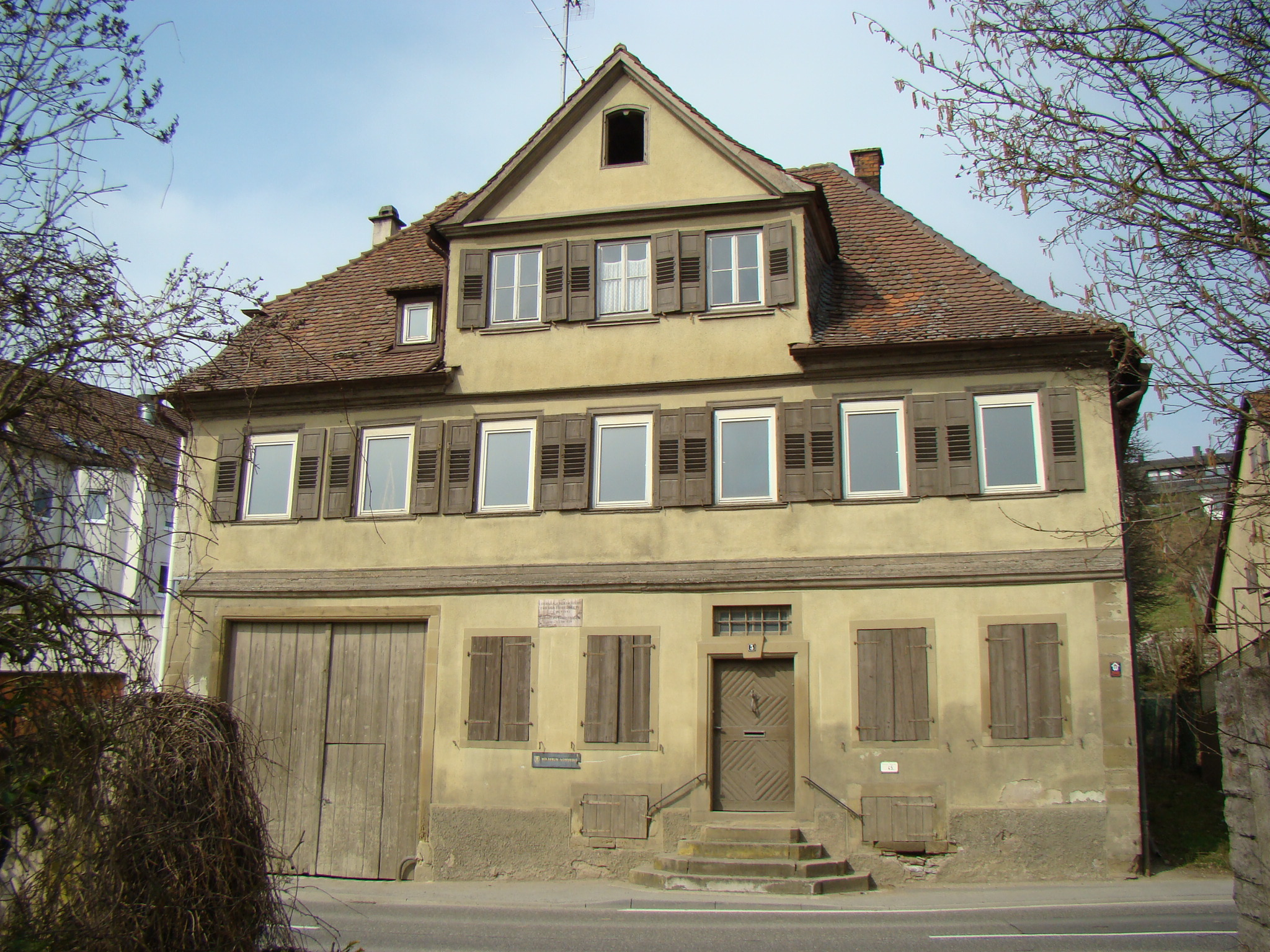 Elternhaus von Friedrich Hölderlin in Lauffen am Neckar